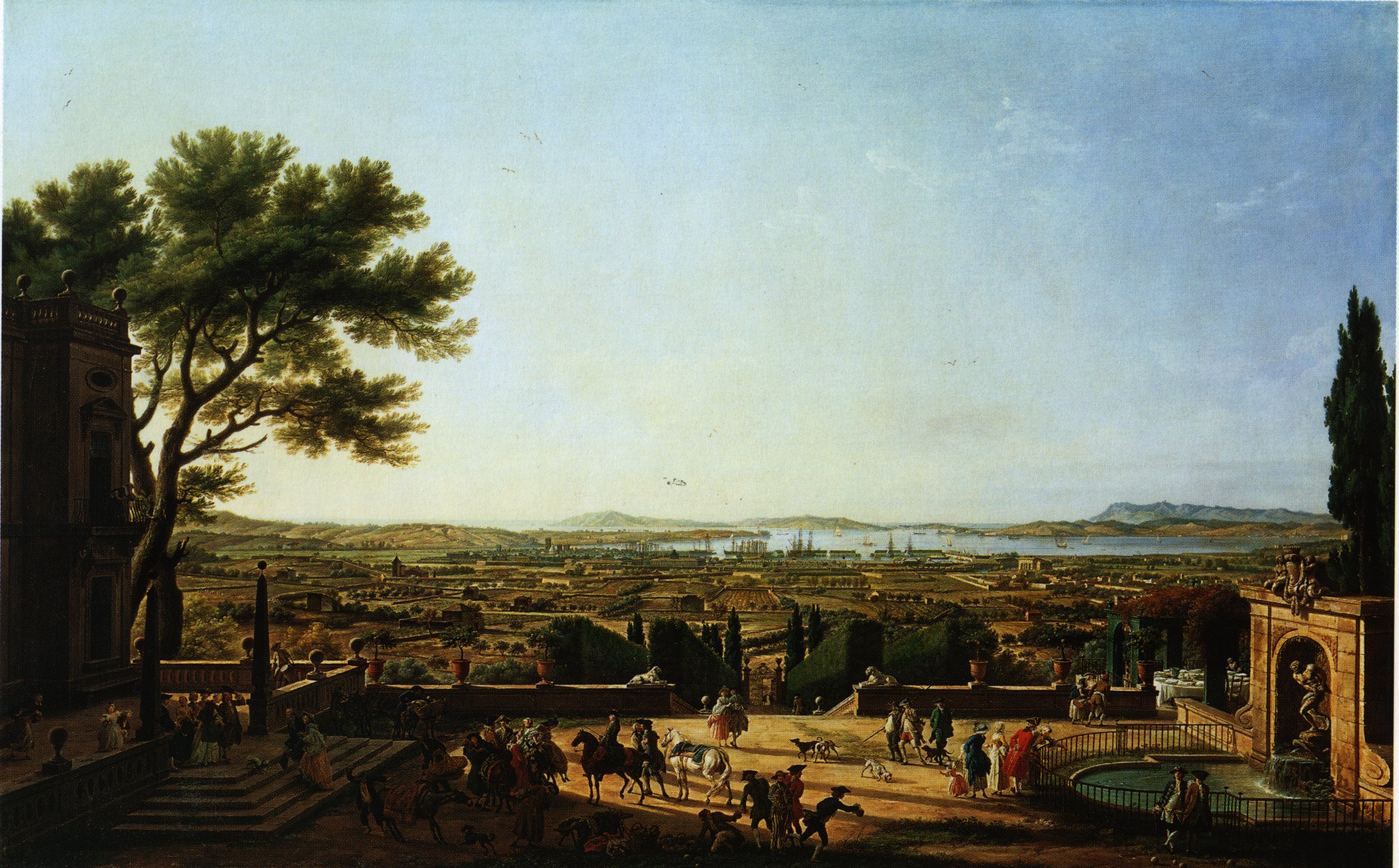 Deuxième vue, le port de Toulon, vue du Mont Faron